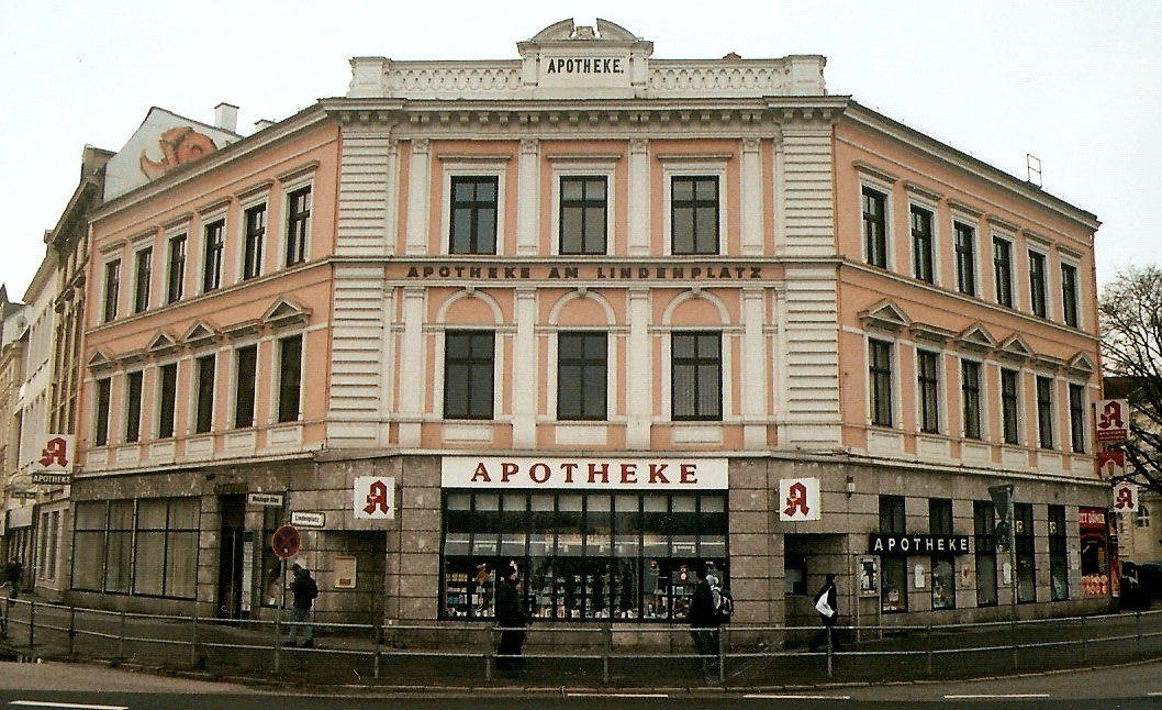 Mühsams Apotheken-Gebäude, Ecke zur Moislinger Allee